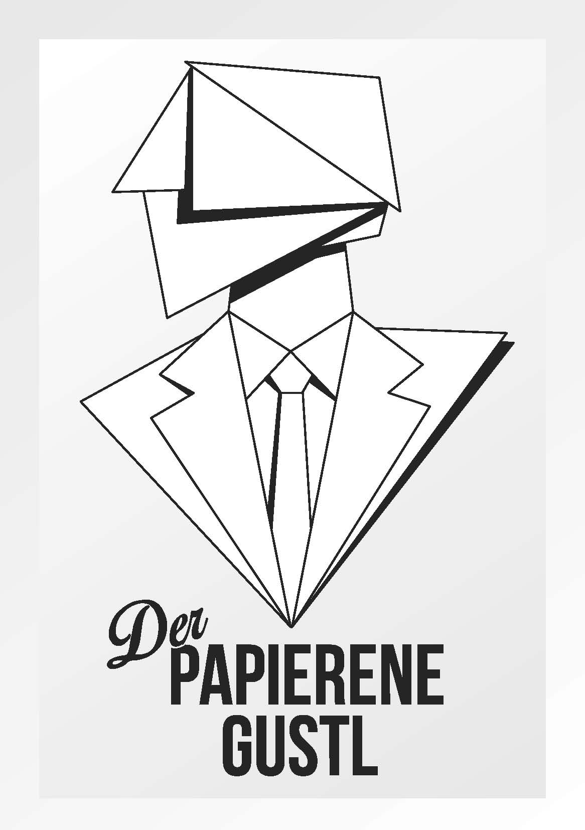 Neues Logo des Filmpreises "Papierener Gustl" ab 2015